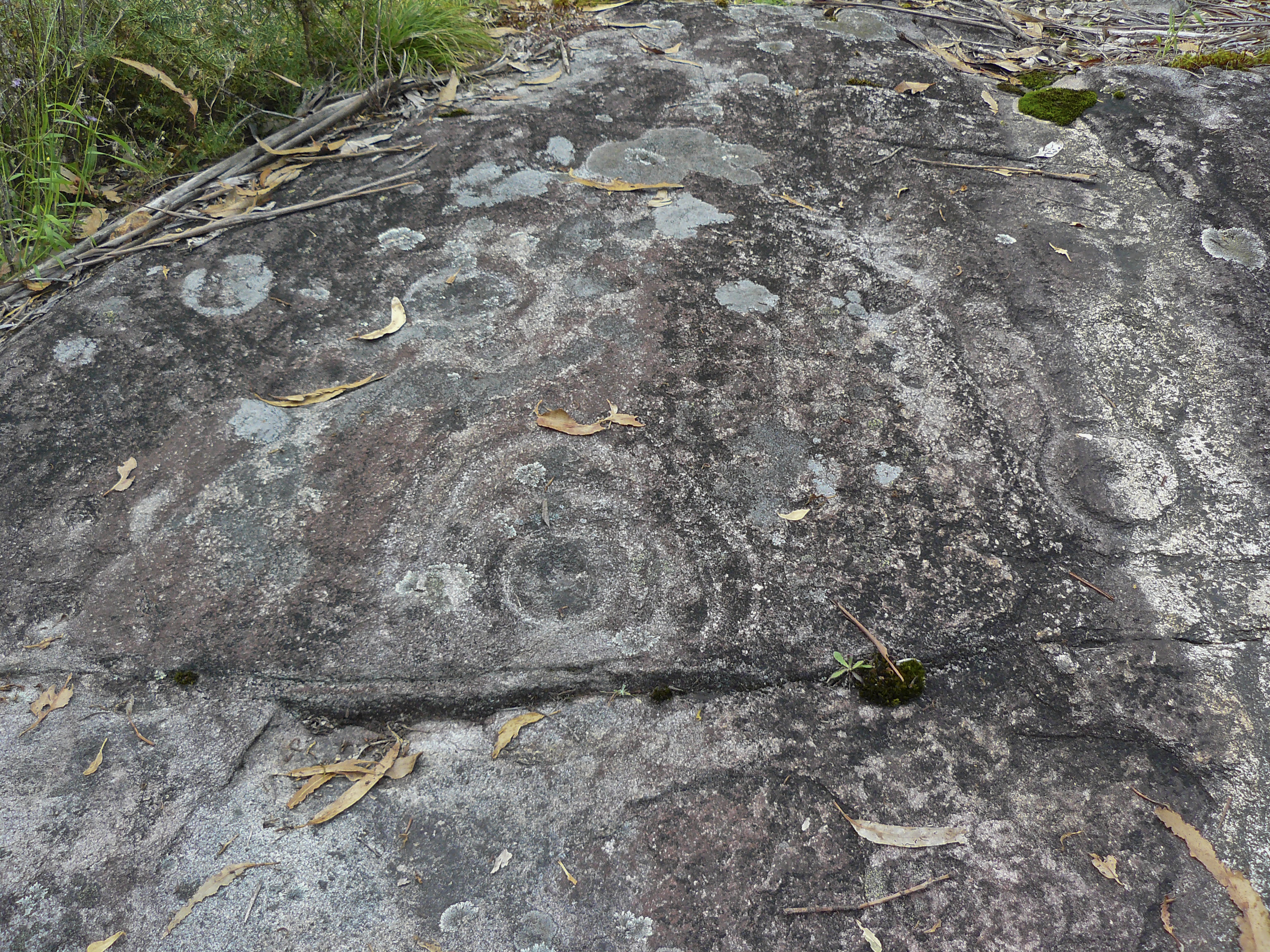 Petróglifos de Lesende, Lousame